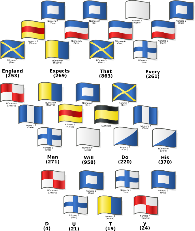 Mensaje de Nelson Codifiado en la Batalla de Trafalgar